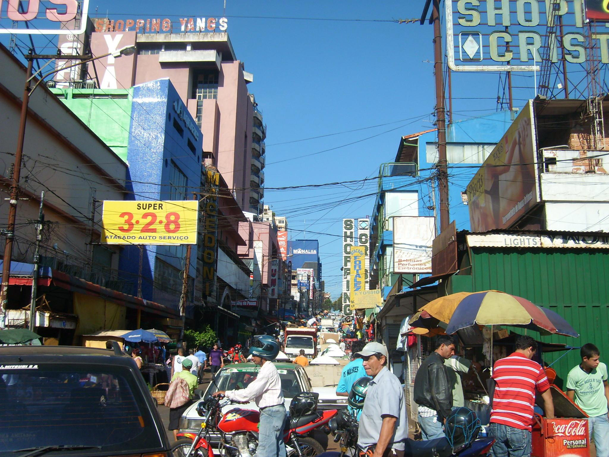 Ciudad del este-paraguai